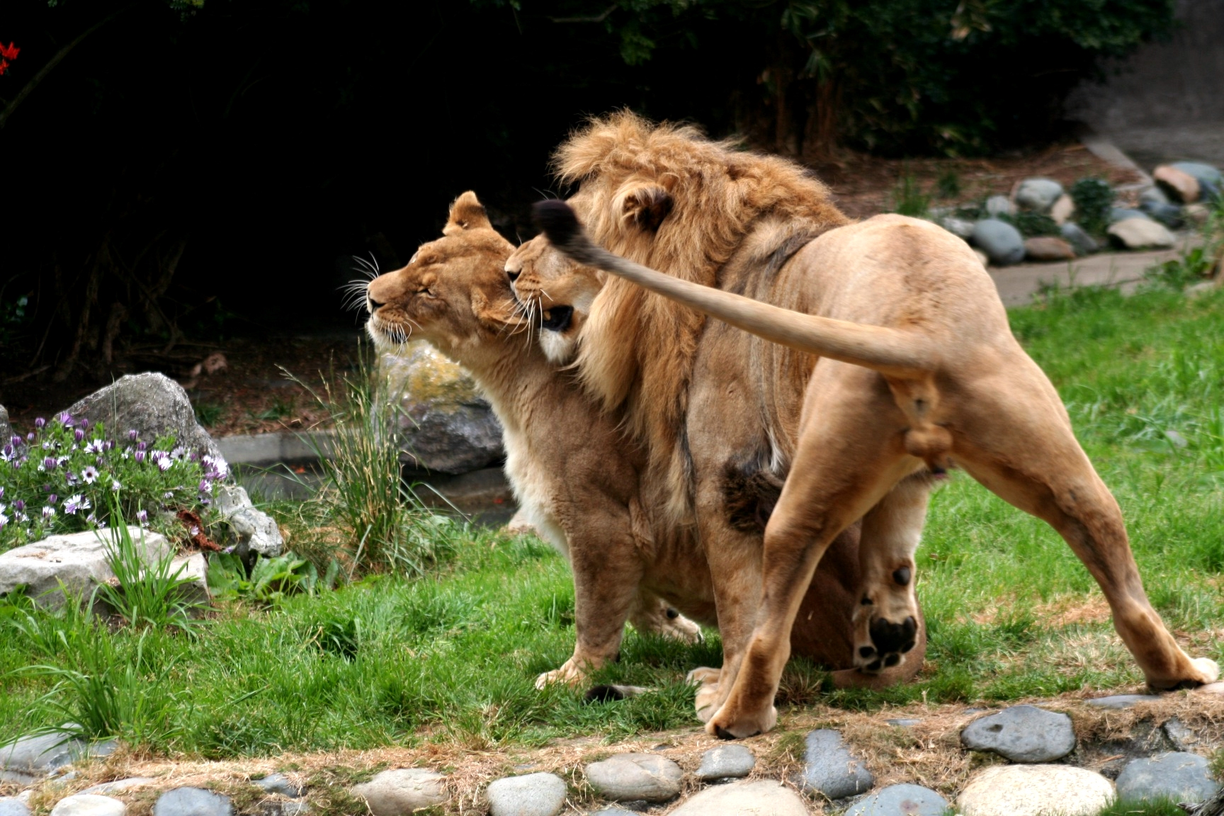 Male and FemaleLions,San Francisco Zoo,San Francisco.